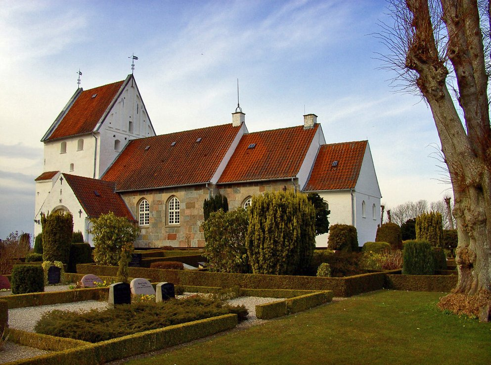 fra sydøst